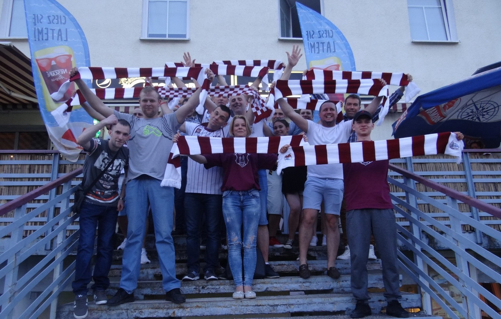 Kibice Spójni w podziękowaniu dla Spójni i GKS Tychy za świetny półfinał (29.04.2018)